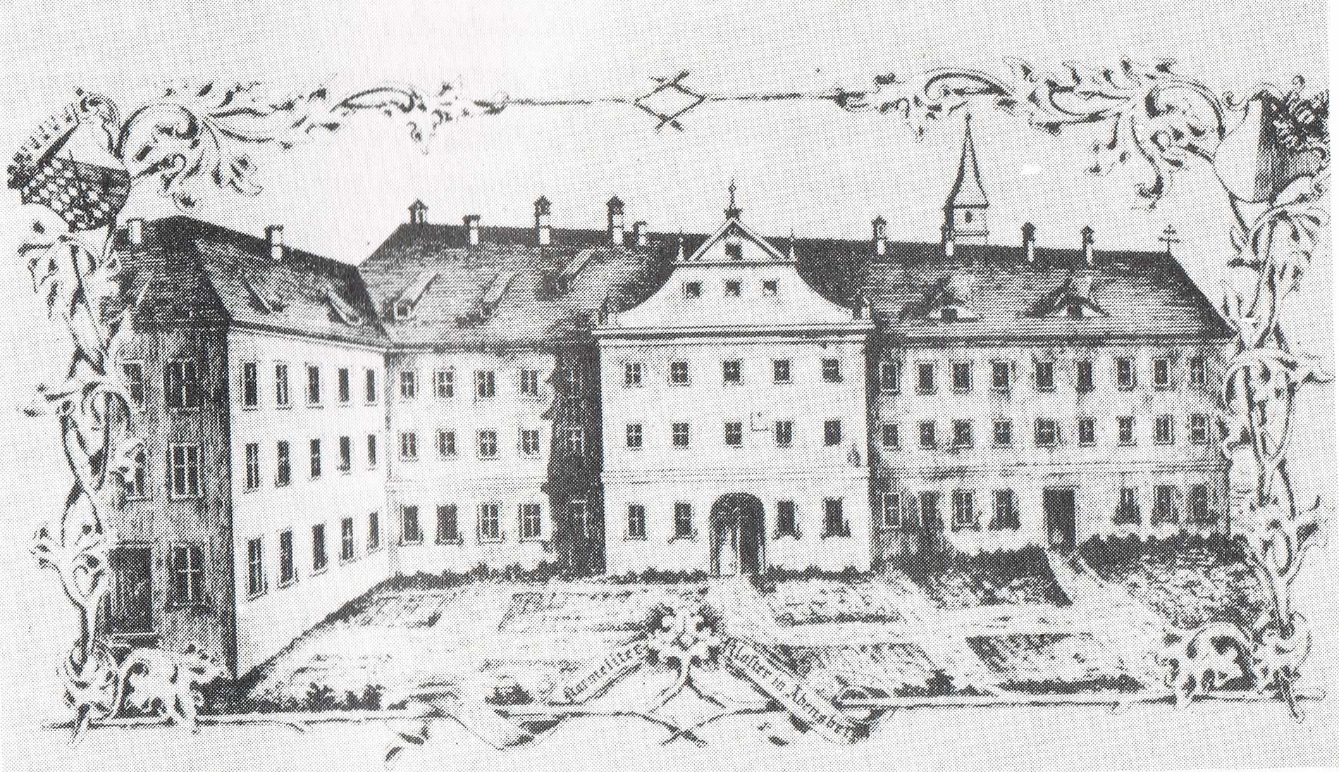 Ansicht des ehemaligen, während der Säkularisierung aufgehobenen Karmelitenklosters Abensberg, Landkreis Kelheim, Niederbayern